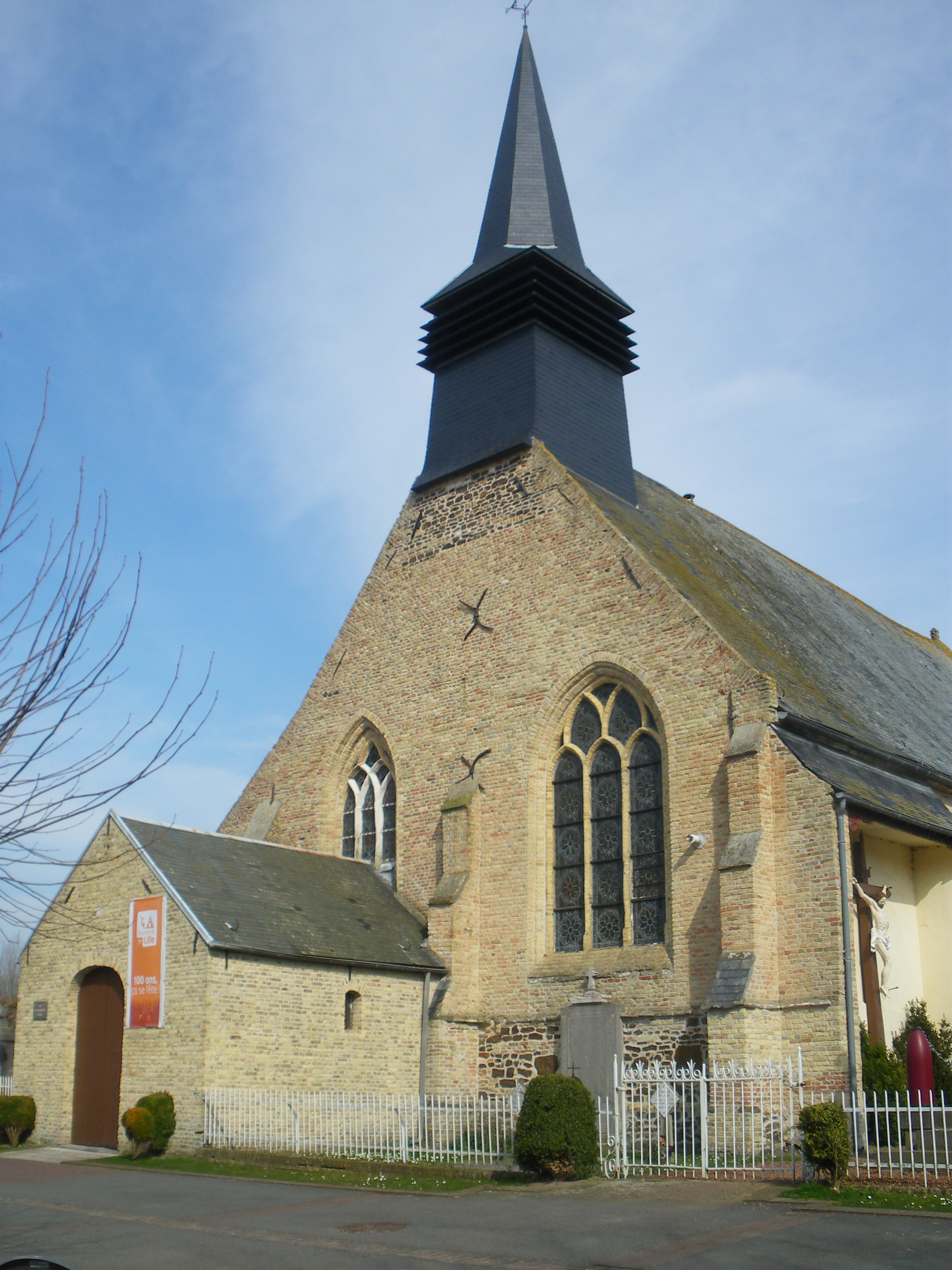 Vue de l'église Saint-Georges de Crochte.